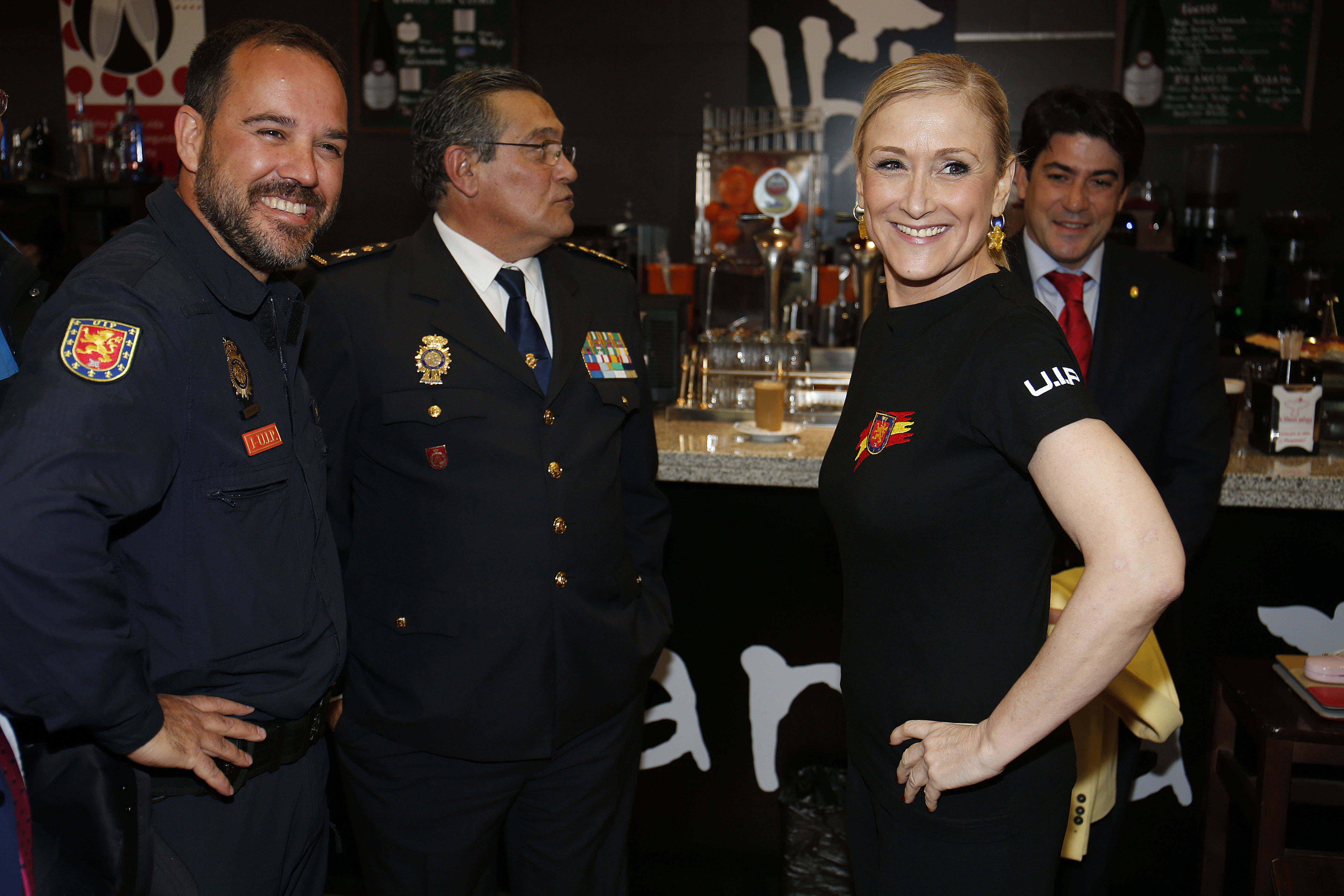 «Este jueves he celebrado mi último acto como delegada del Gobierno. Aunque son los demás quienes deben juzgar mi labor, creo, sinceramente, que he cumplido los compromisos que asumí con los madrileños, de forma honesta y responsable. En mi ánimo ha estado siempre trabajar por y para ellos, defendiendo en todo momento los intereses generales. Foto. D. Sinova»